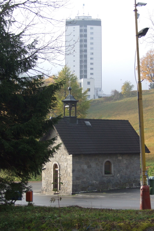 Pec pod Snezkou, Tschechen: Kontrast damals und Heute Fotograf: Harald Rossa Datum: Oktober 2006 Höher aufgelöste Version ist verfügbar